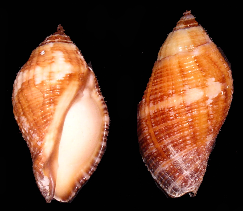 Francolina Jopas, Nassa francolina.